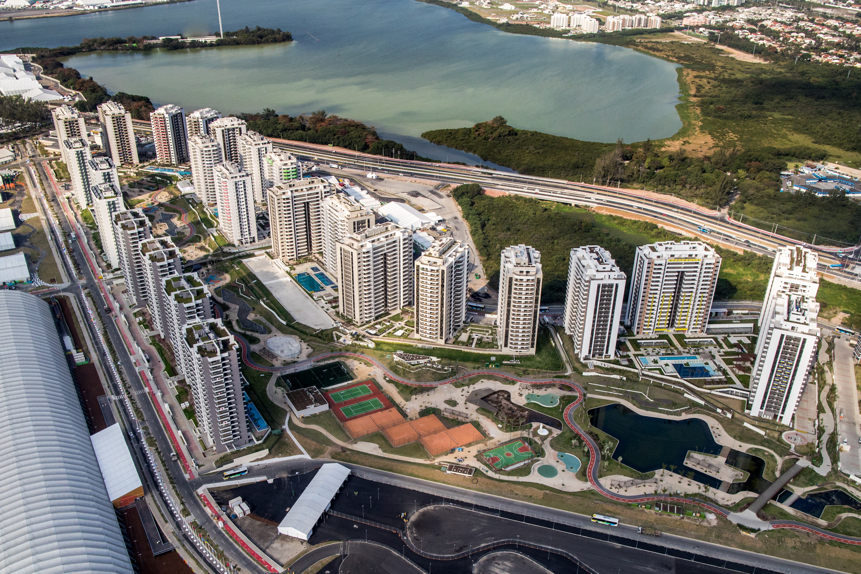 A Barra também será a casa dos atletas, com os 31 prédios da Vila Olímpico.